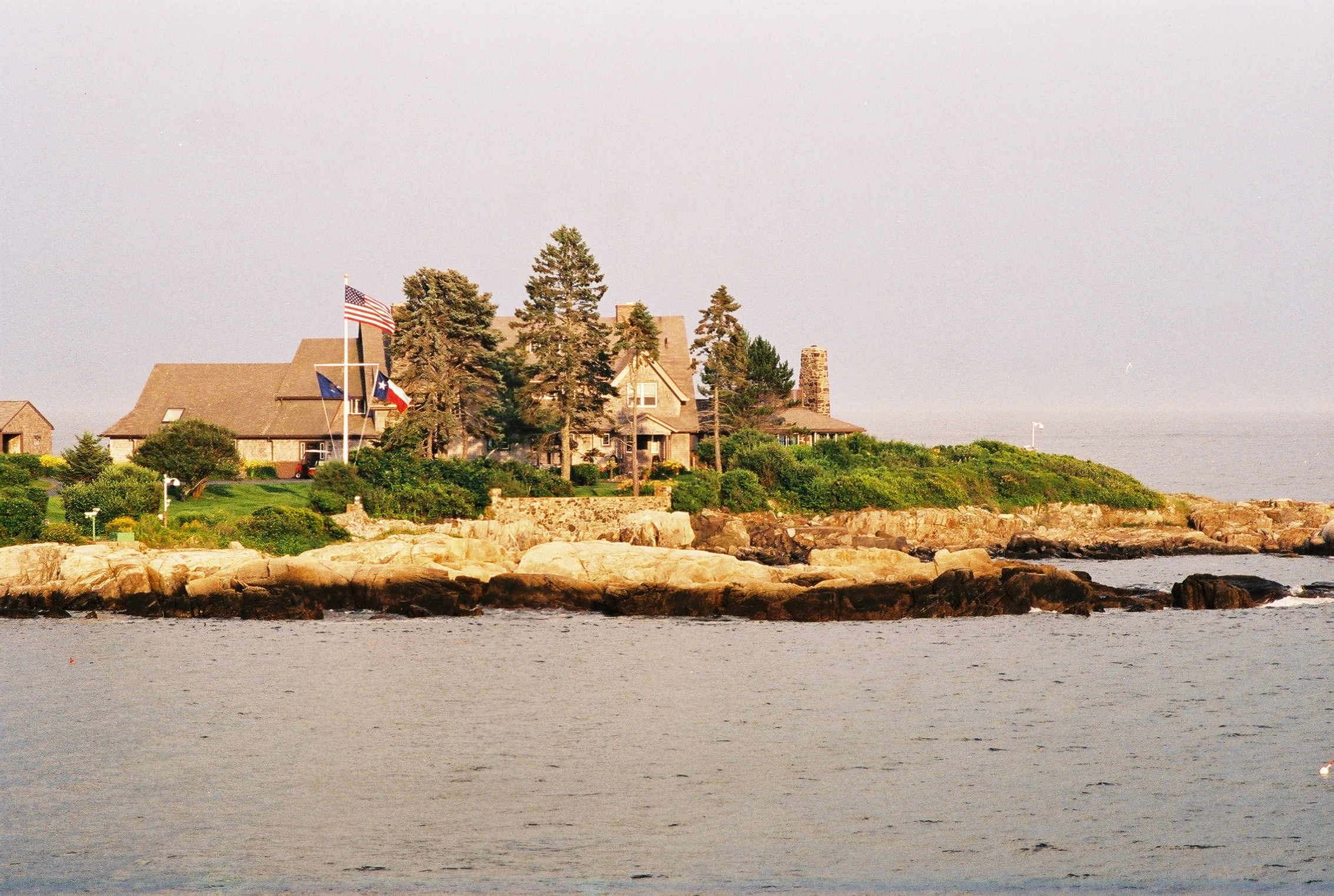 Résidence des Bush à Kennebunkport dans le Maine